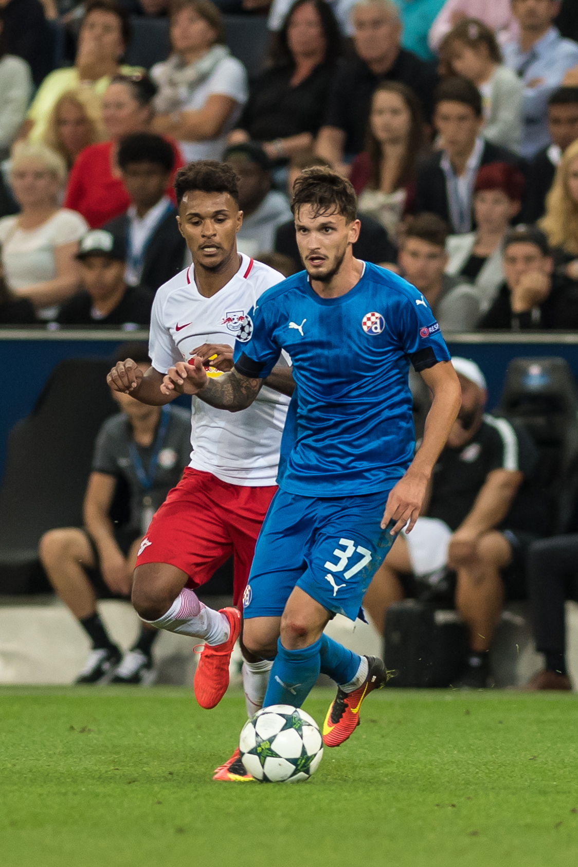 UEFA Champions League - Play-Offs - FC Salzburg vs Dinamo Zagreb. Bild zeigt Valentino Lazaro (RBS) und Petar Stojanovic (Dinamo Zagreb).